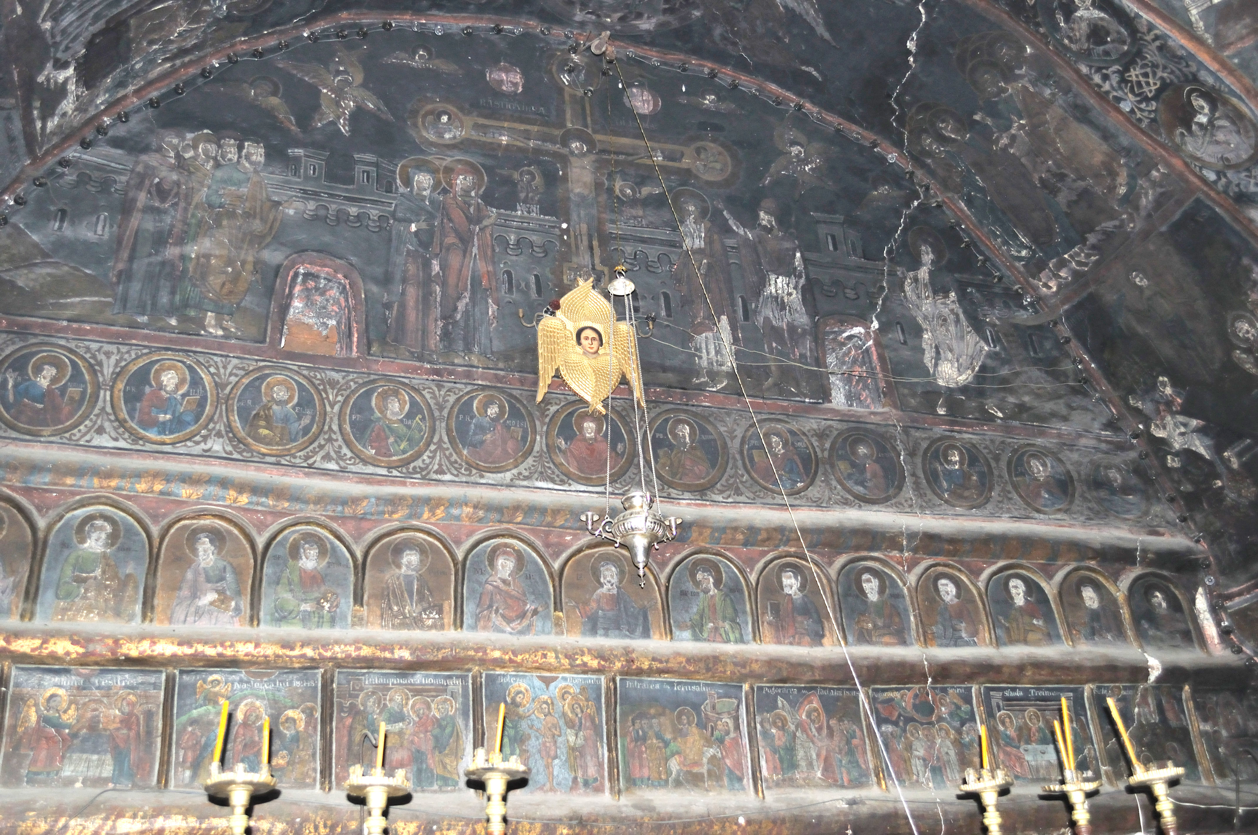 Biserica „Intrarea în Biserică a Maicii Domnului” sat Bărbătești, cătun Mierlești, județul Vâlcea